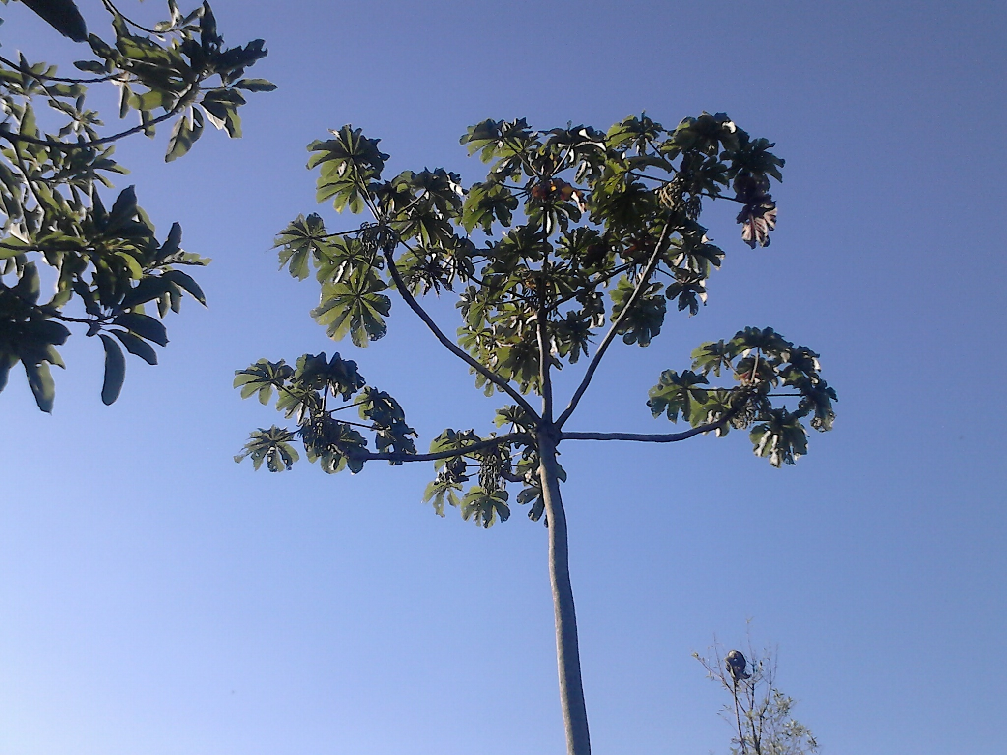 Embaúba no sul de Minas Gerais